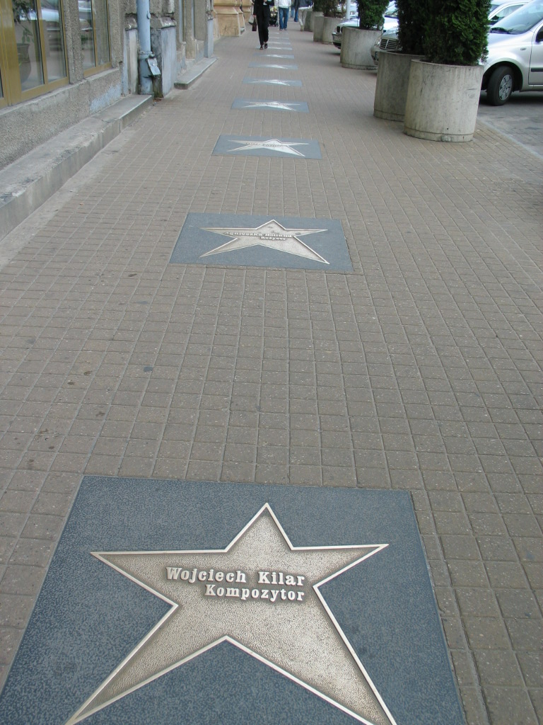 Aleja Gwiazd w Łodzi, Wojciech Kilar.